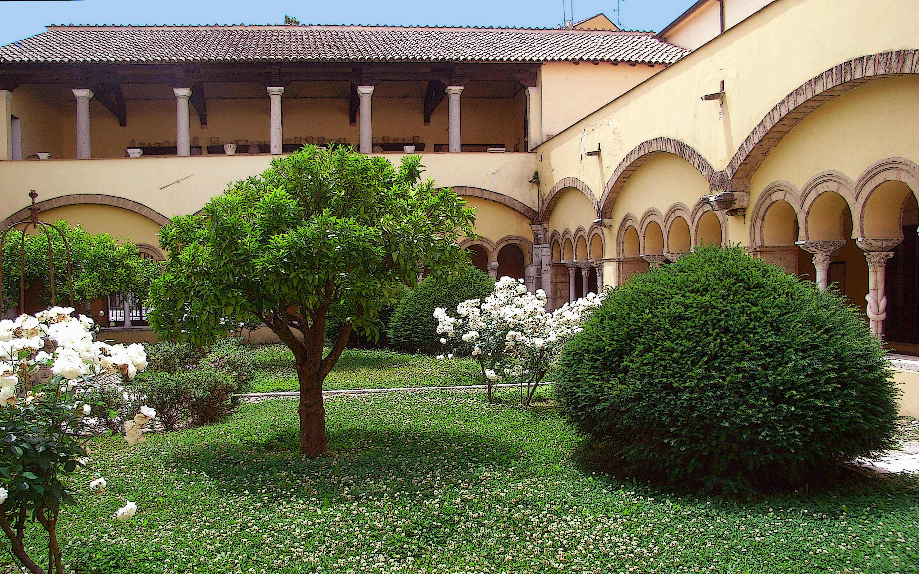 Risalente alla metà del XII secolo, il chiostro di S. Sofia è costituito da ampie arcate ricadenti su massicci pilastri tra i quali si aprono delle quadrifore con archi a ferro di cavallo. Sui capitelli si svolge un ampio ciclo scultoreo non unitario per soggetti ed esecutori